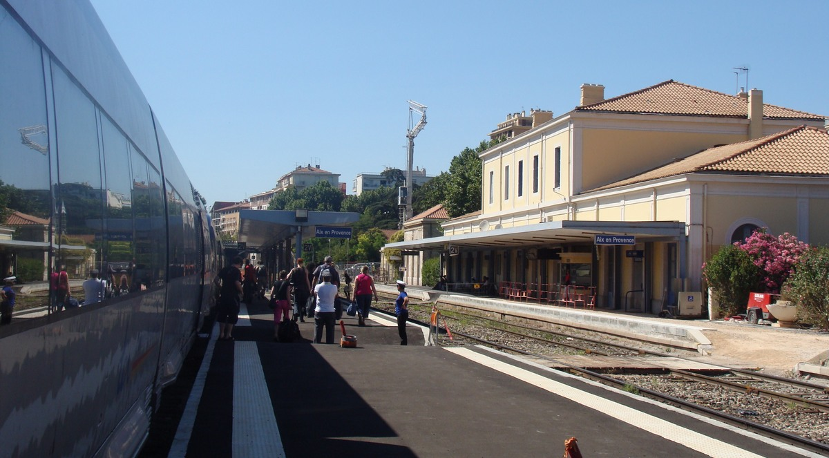 Une rame d'autorails assurant une liaison Briançon - Marseille fait halte en gare d'Aix-en-Provence (ville).